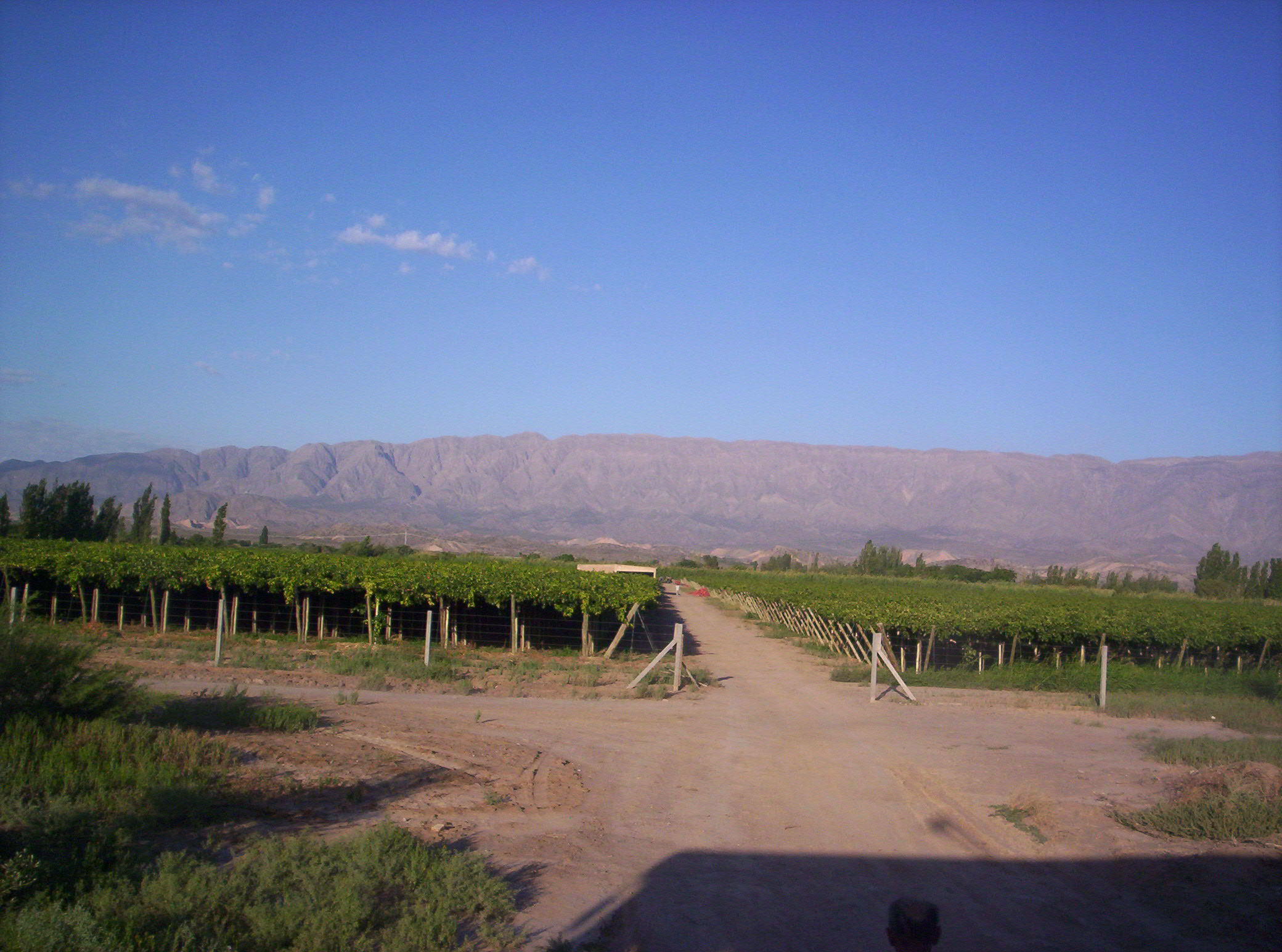 Fotografía de unas plantaciones de viñedos en la localidad de Carpintería, departamento Pocito, San Juan, Argentina Photograph of some plantations vineyard in the town of Carpintería, department Pocito, San Juan, Argentina